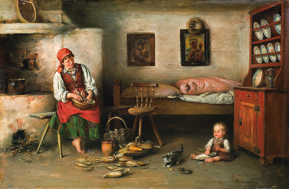 W izbie Franciszek Ejsmond (1859-1931) Wymiary : 14 x 21.5 cm olej/deska sygnowany p.d.: F Ejsmond Na odwrocie szeregi cyfr: 315 NJ 2407757888; 1415/01/ 88 | 25 000.- ; 14\215